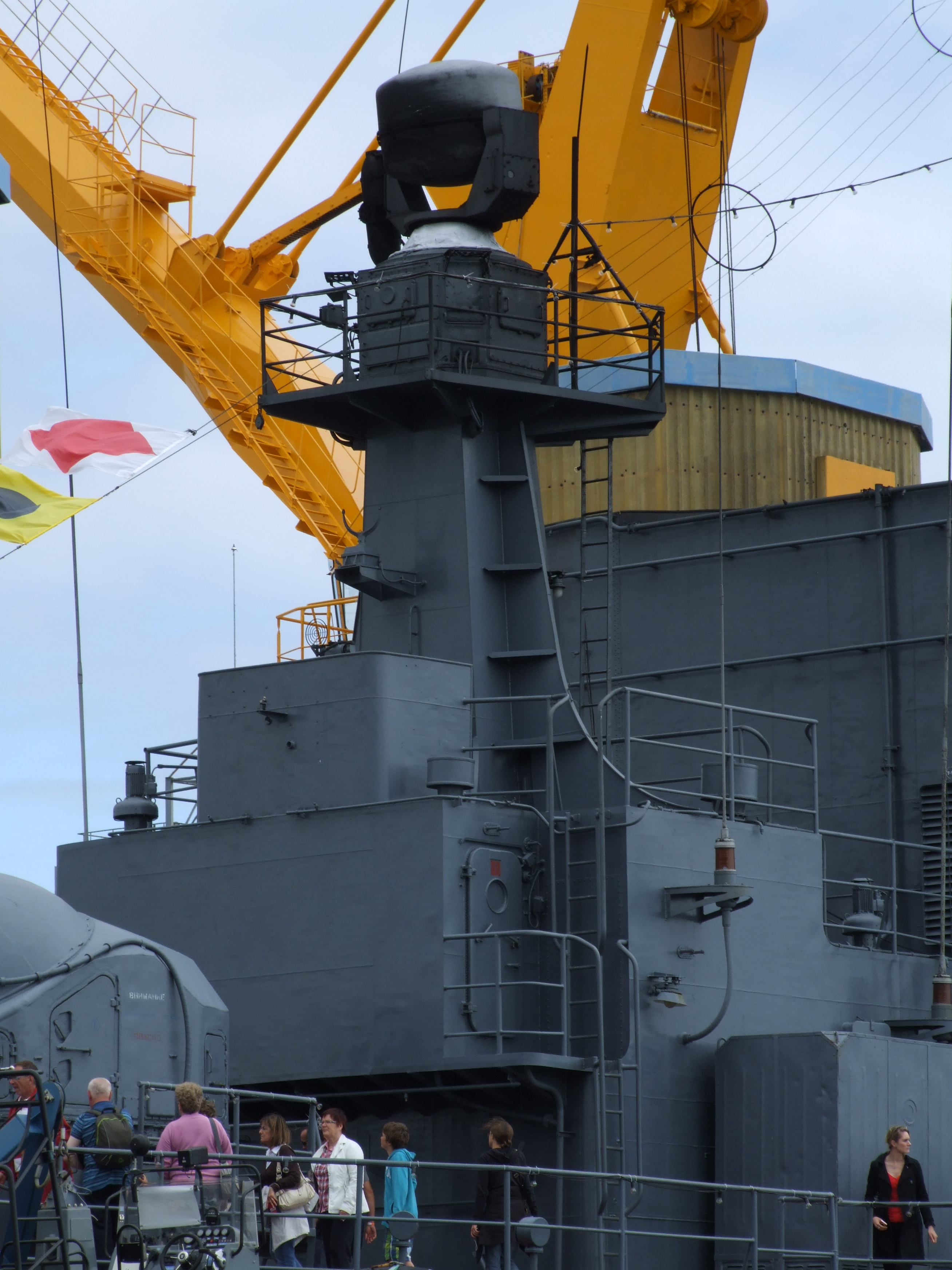 Tonnerres de Brest 2012 : le Kaliningrad (BDK-58), navire de débarquement de la flotte baltique russe : Radar de guidage du système anti aérien AK-725